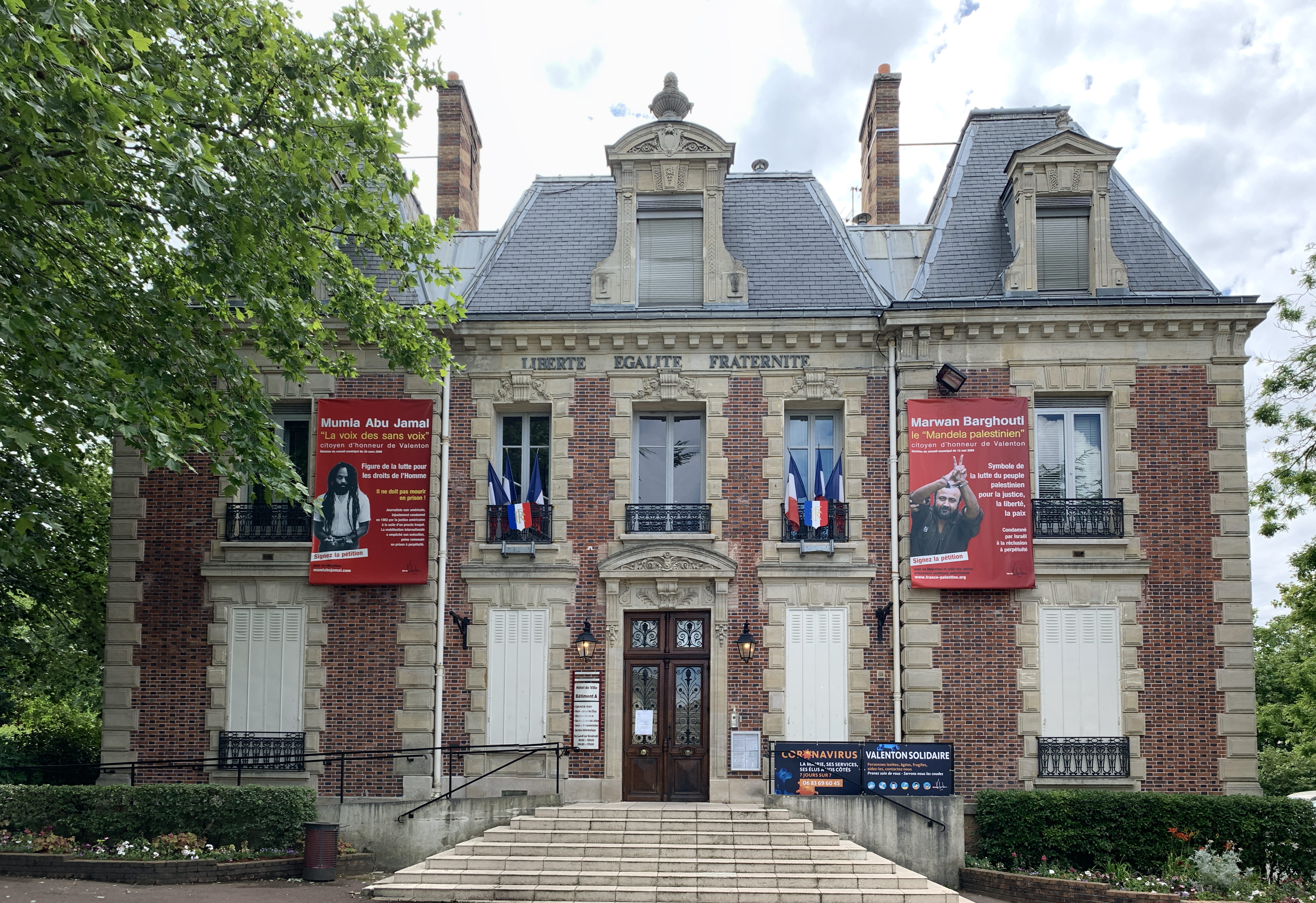 Hôtel de ville de Valenton.